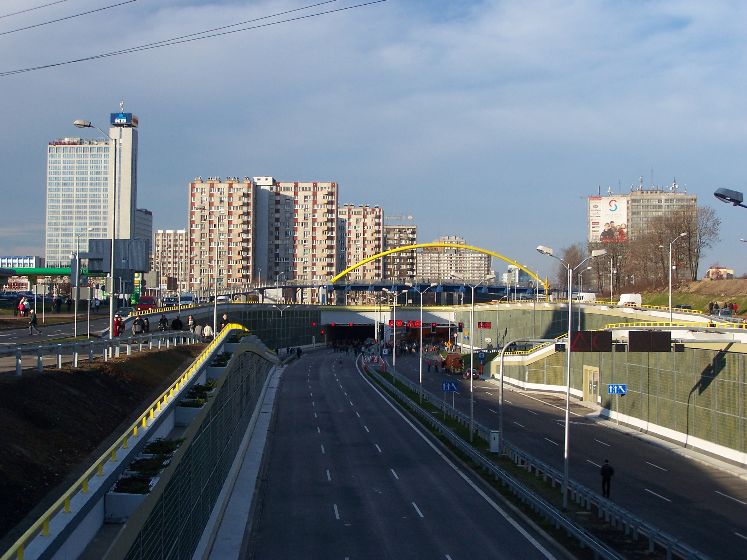 Wjazd od strony Sosnowca do tunelu pod Rondem w Katowicach.